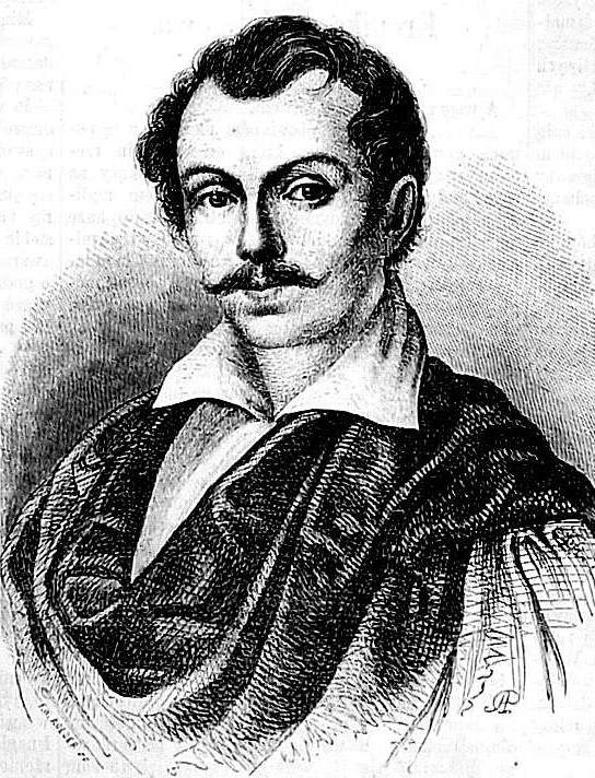 Dominik Magnuszewski 1810-1845